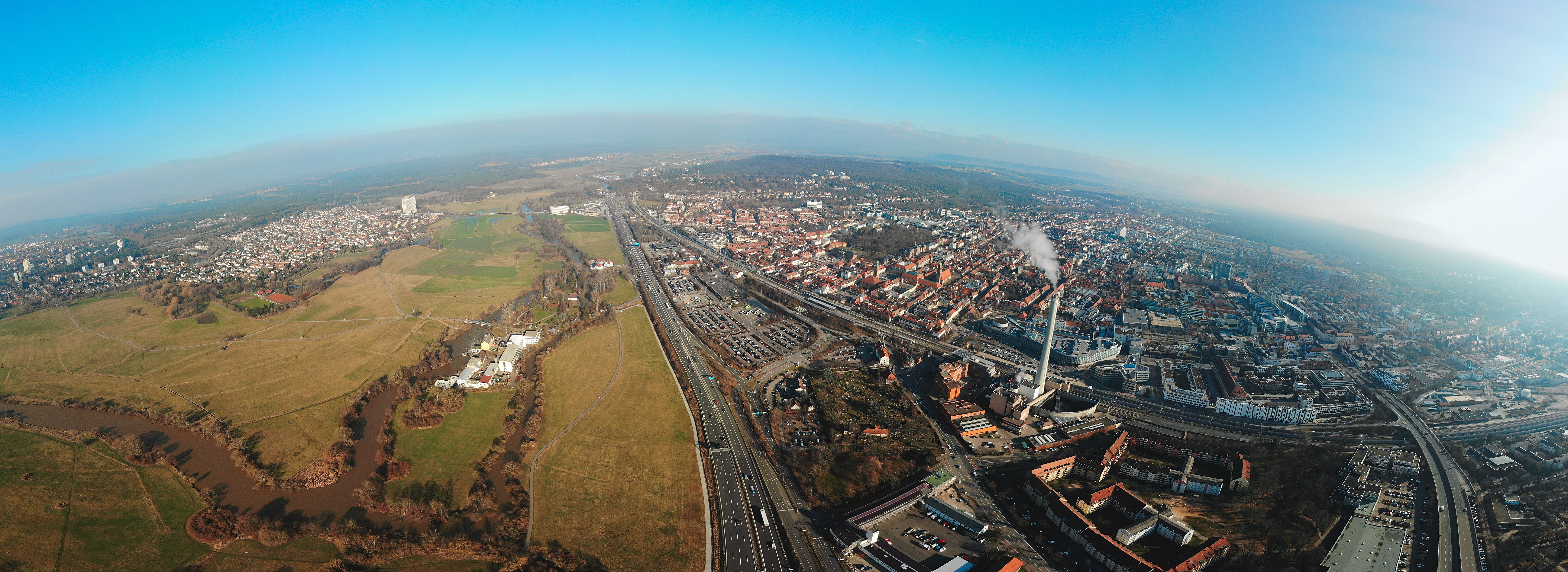 Erlangen Panorama Luftaufnahme (2020)